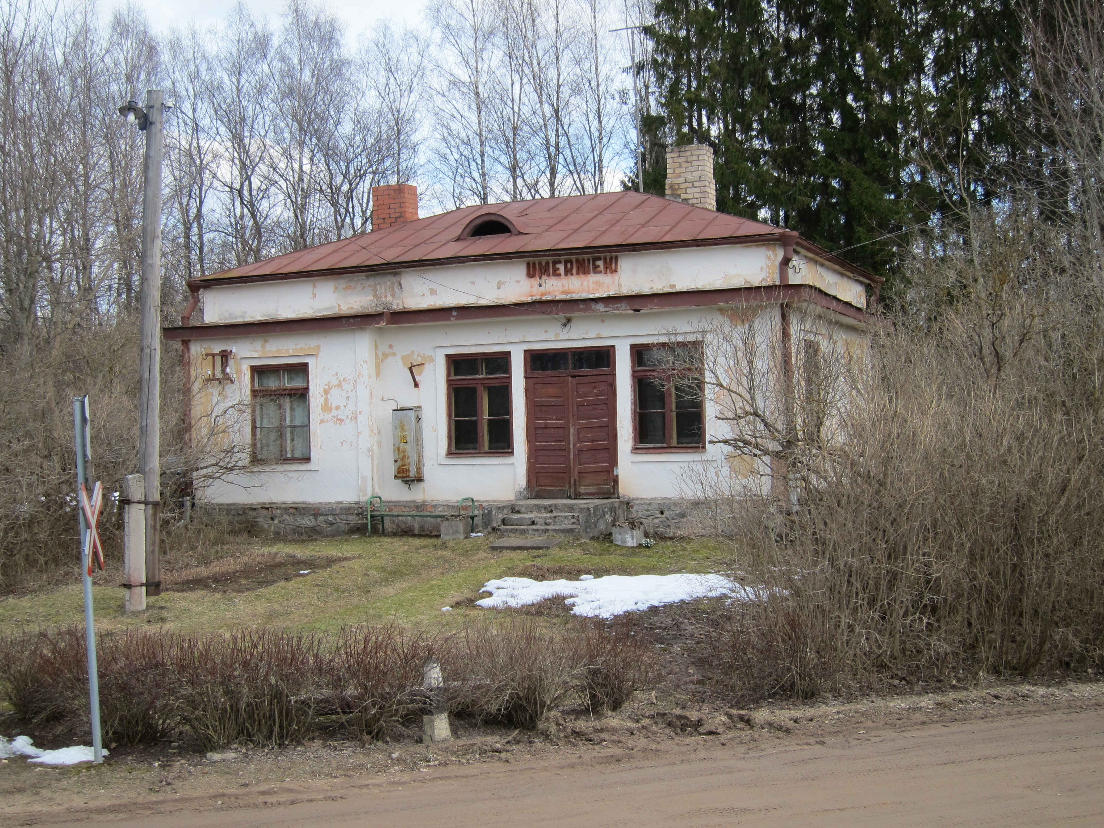 Umernieku stacijas ēka